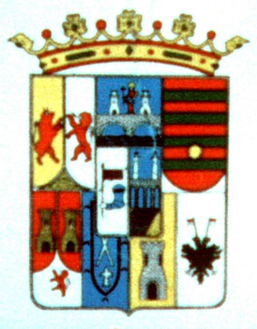 Escudo de El Poyo, en municipio de San Vitero (Zamora, España)